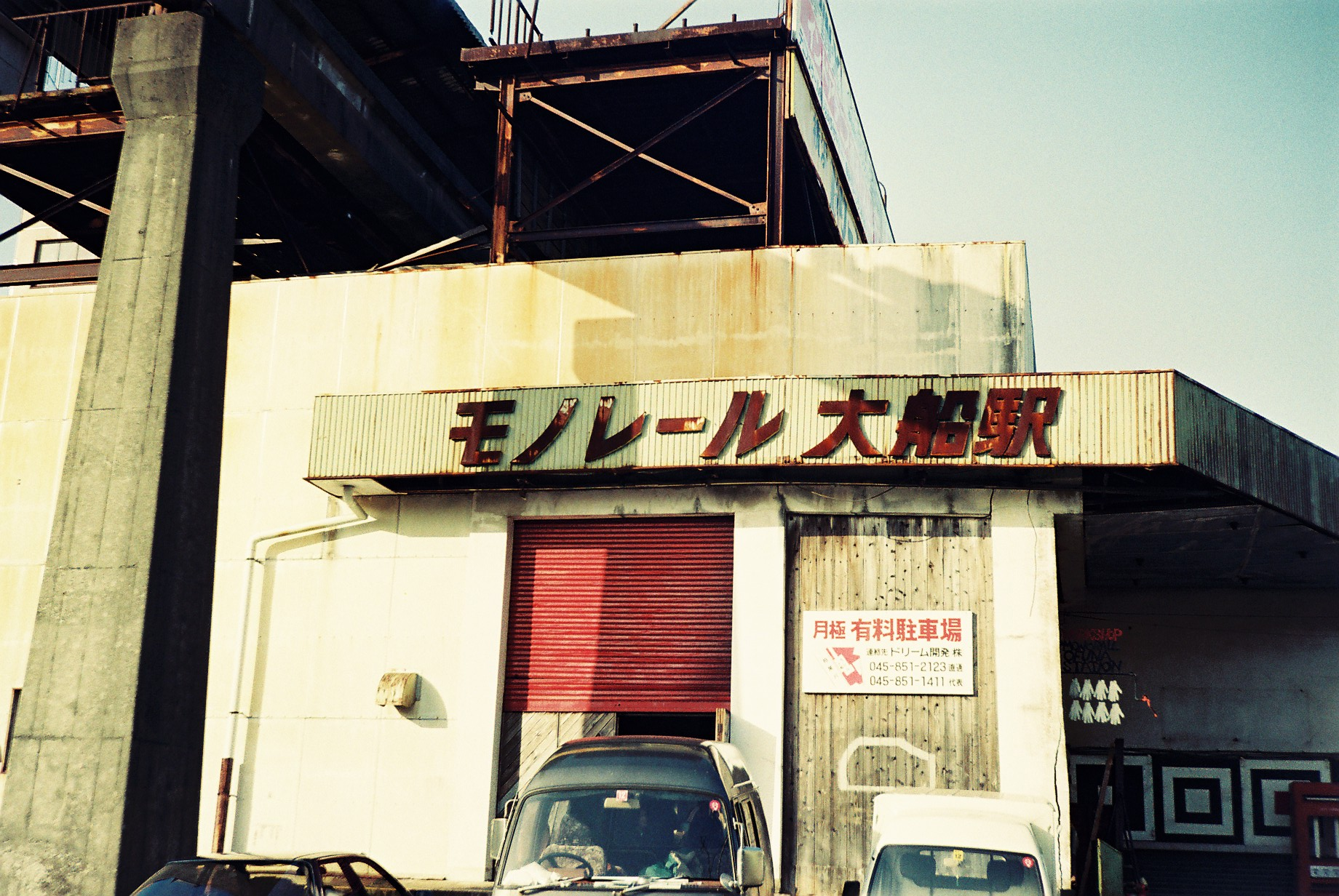 ドリームランド線大船駅駅舎（1992年）